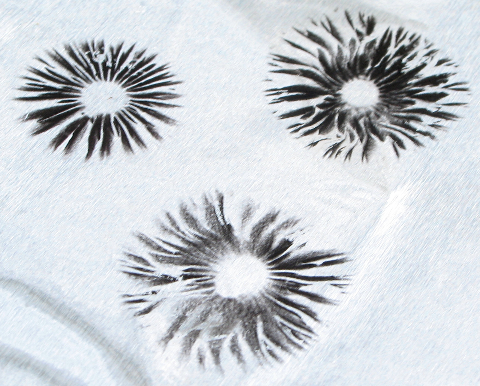 Panaeolus cinctulus (Bolton) Britzelm.